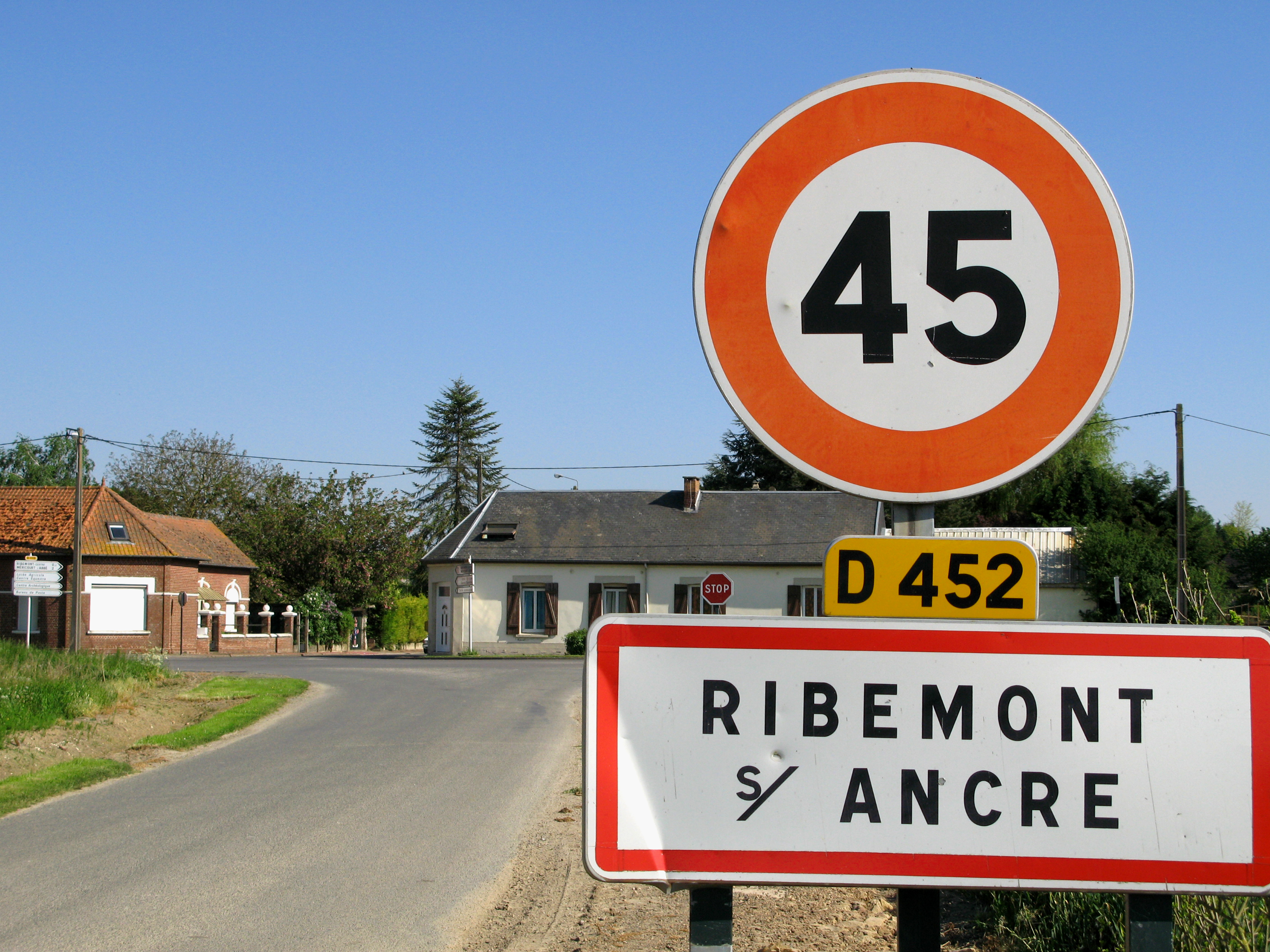 Ribemont-sur-Ancre (Somme, France) Panneau à l'entrée du village. Juste à droite avant ce panneau, se trouve le cimetière militaire.